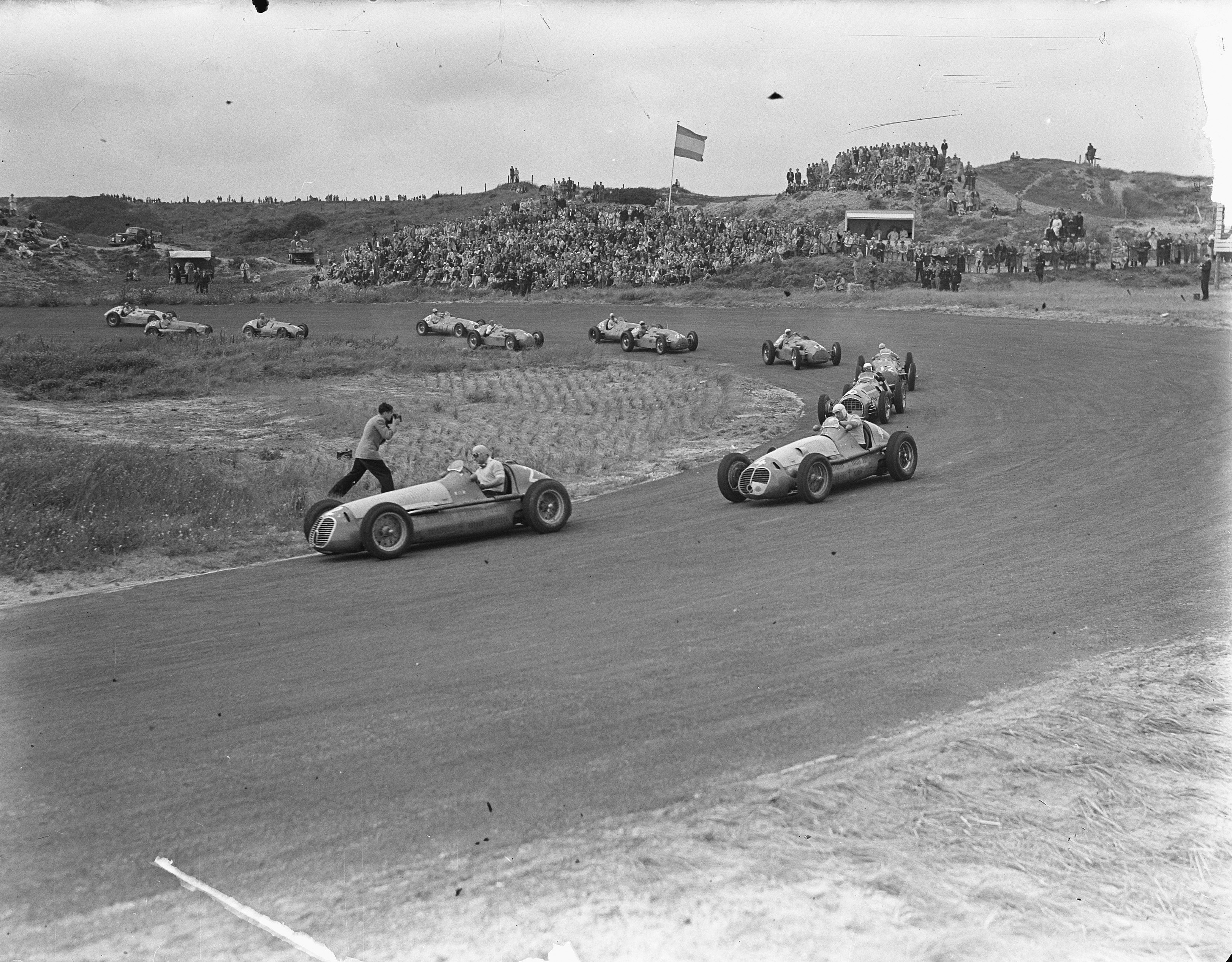 Collectie / Archief : Fotocollectie Anefo Reportage / Serie : [ onbekend ] Beschrijving : START, autoraces Datum : 21 juli 1950 Locatie : Noord-Holland, Zandvoort Trefwoorden : START, autoraces Fotograaf : Noske, J.D. / Anefo Auteursrechthebbende : Nationaal Archief Materiaalsoort : Glasnegatief Nummer archiefinventaris : bekijk toegang 2.24.01.09 Bestanddeelnummer : 904-0841